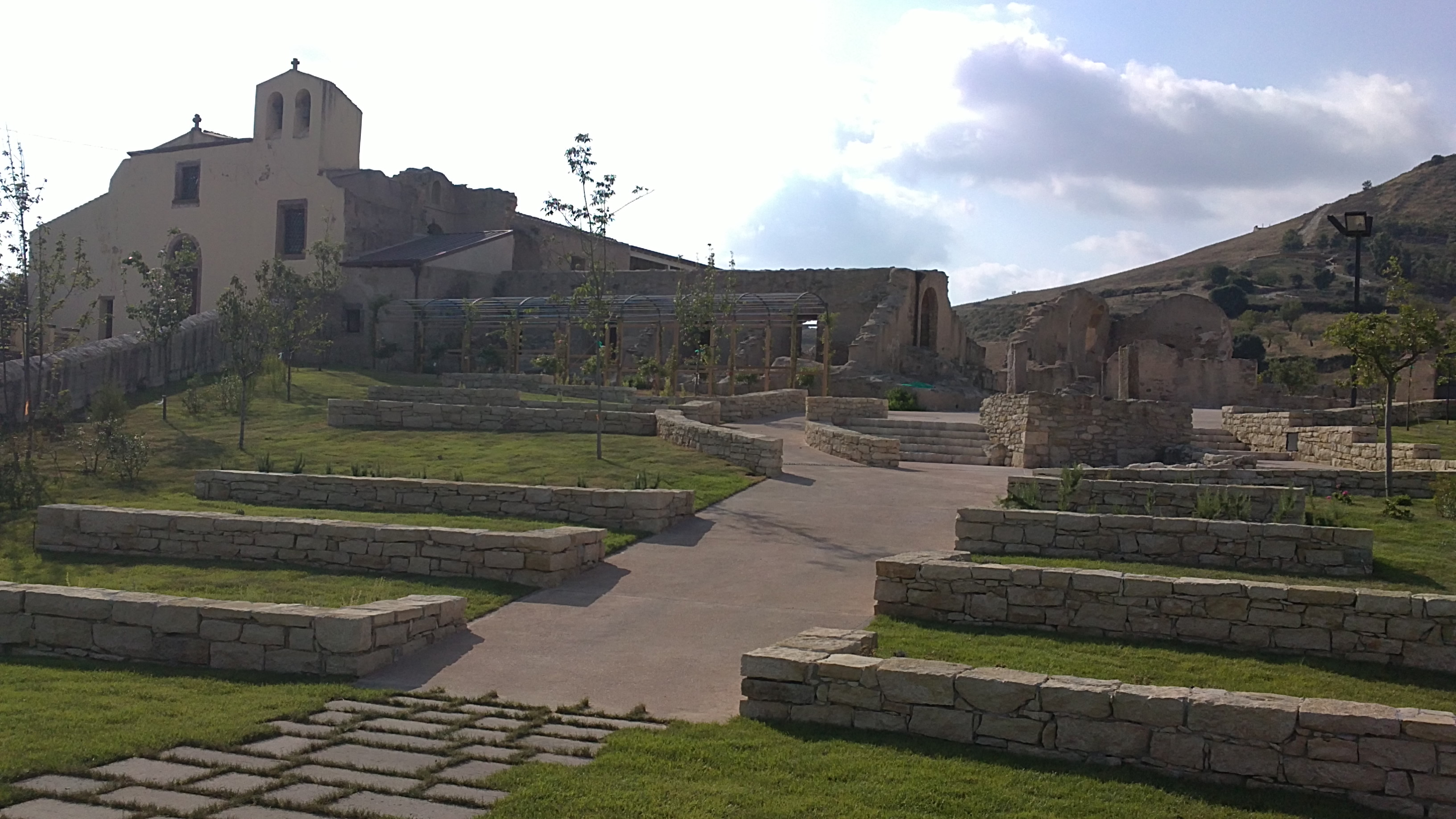 Genoni